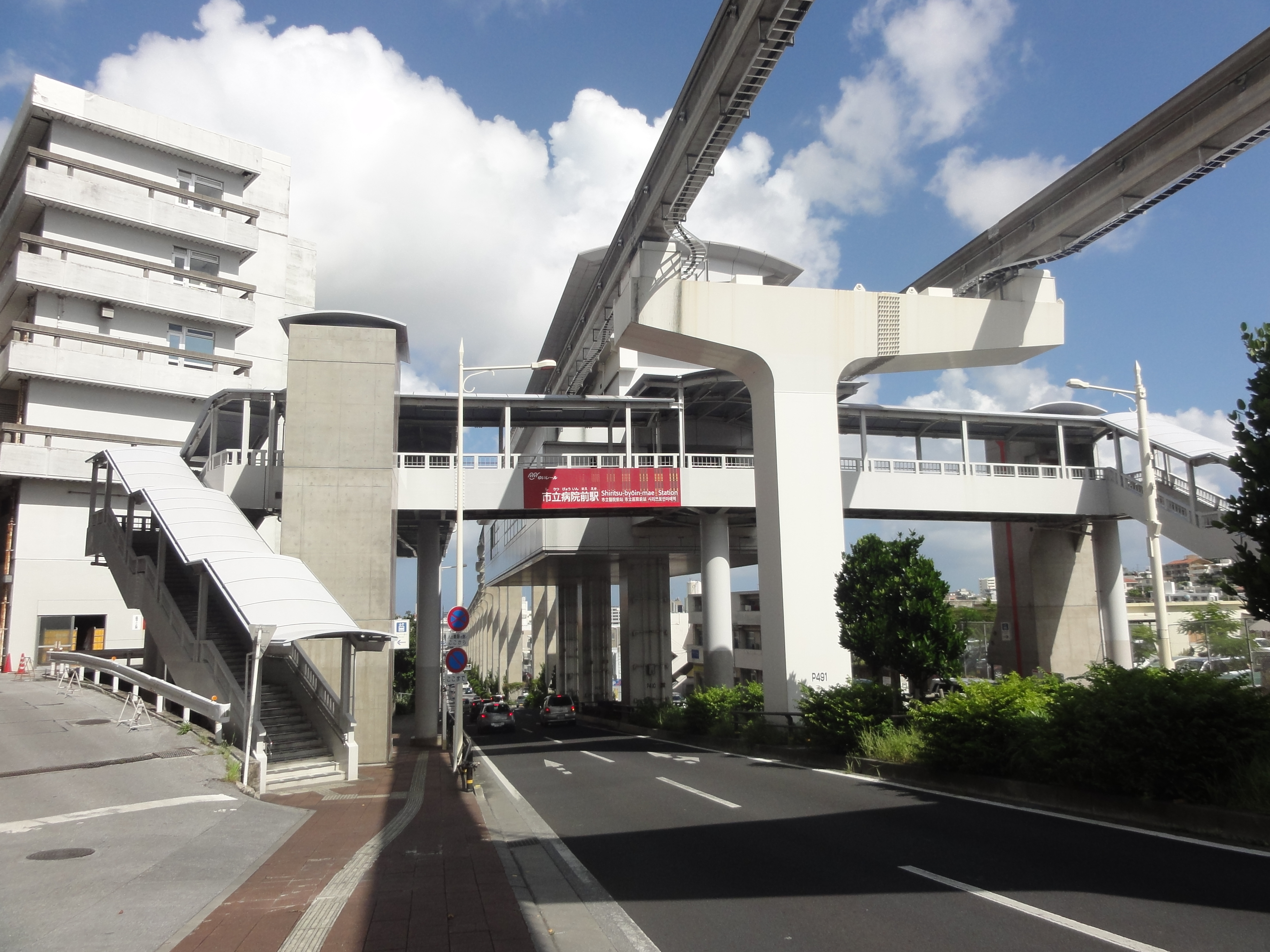 沖縄都市モノレール市立病院前駅